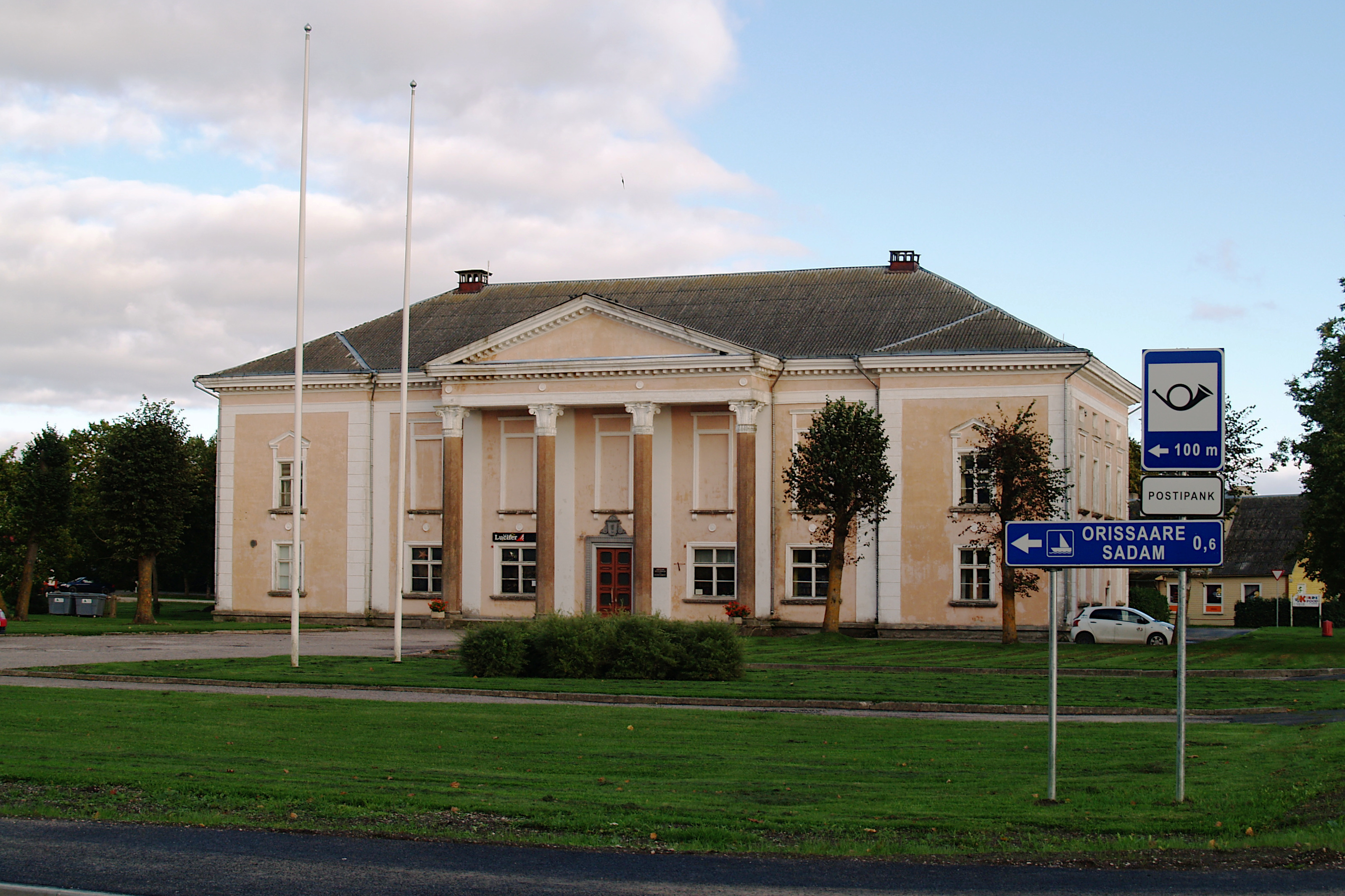 Orissaare kultuurimaja